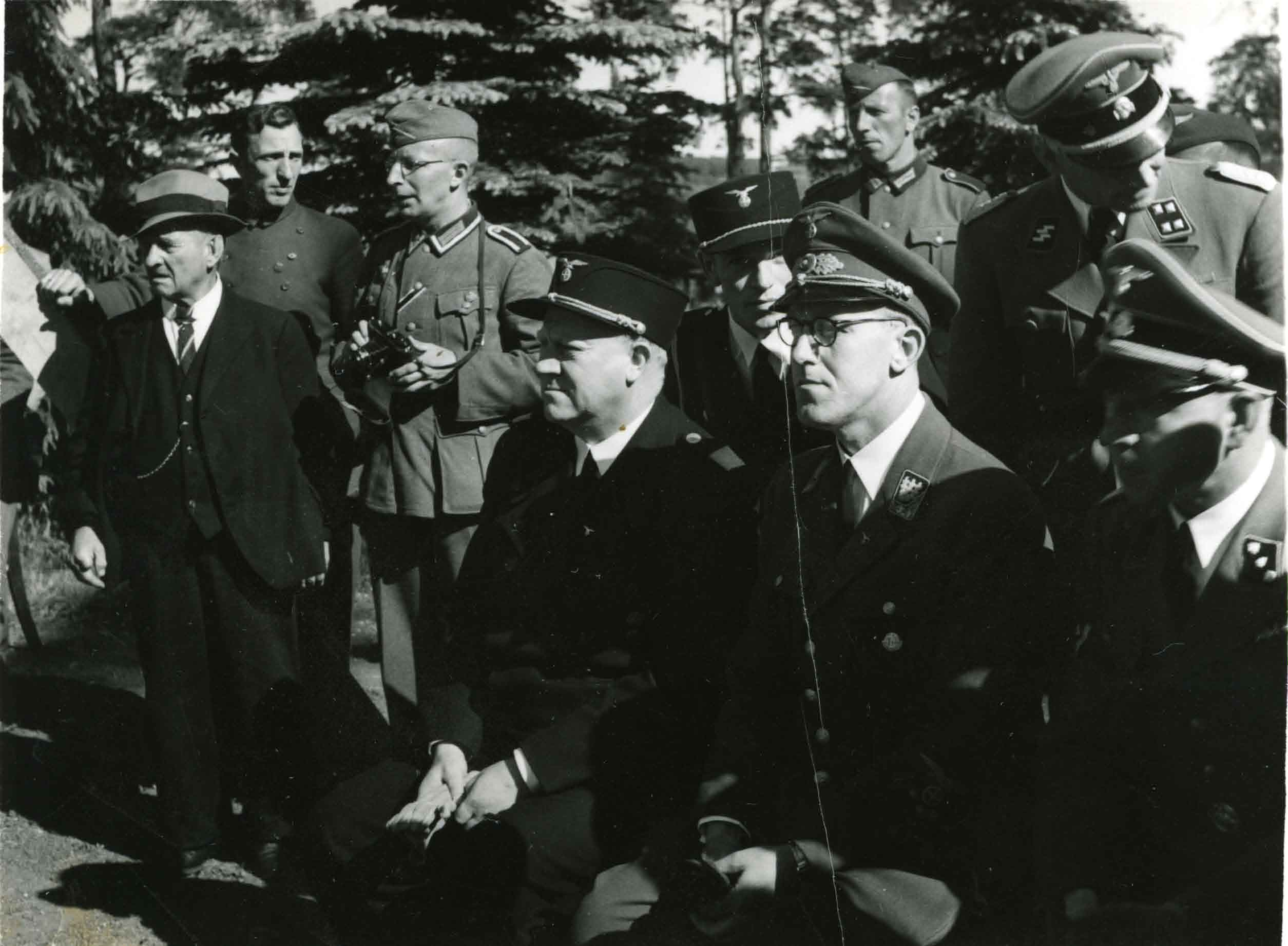 «Vidkun Quisling og tyske offiserer; ukjent datering» viser Vidkun Quisling, leder i det norske nazipartiet Nasjonal Samling (NS) før og under andre verdenskrig, sammen med Olav M. Hoff, fylkesfører i Østfold/Aust-Viken Fylkesorganisasjon av NS, og andre representanter for partiet og de tyske okkupasjonsmyndighetene, under «Borgarting» i Sarpsborg 20.–21. juni 1942, et partistevne som ble avholdt blant annet i Festiviteten/«Olavs hall» og Kulåsparken. RA/PA-0781/Fd/0004/0671 1196